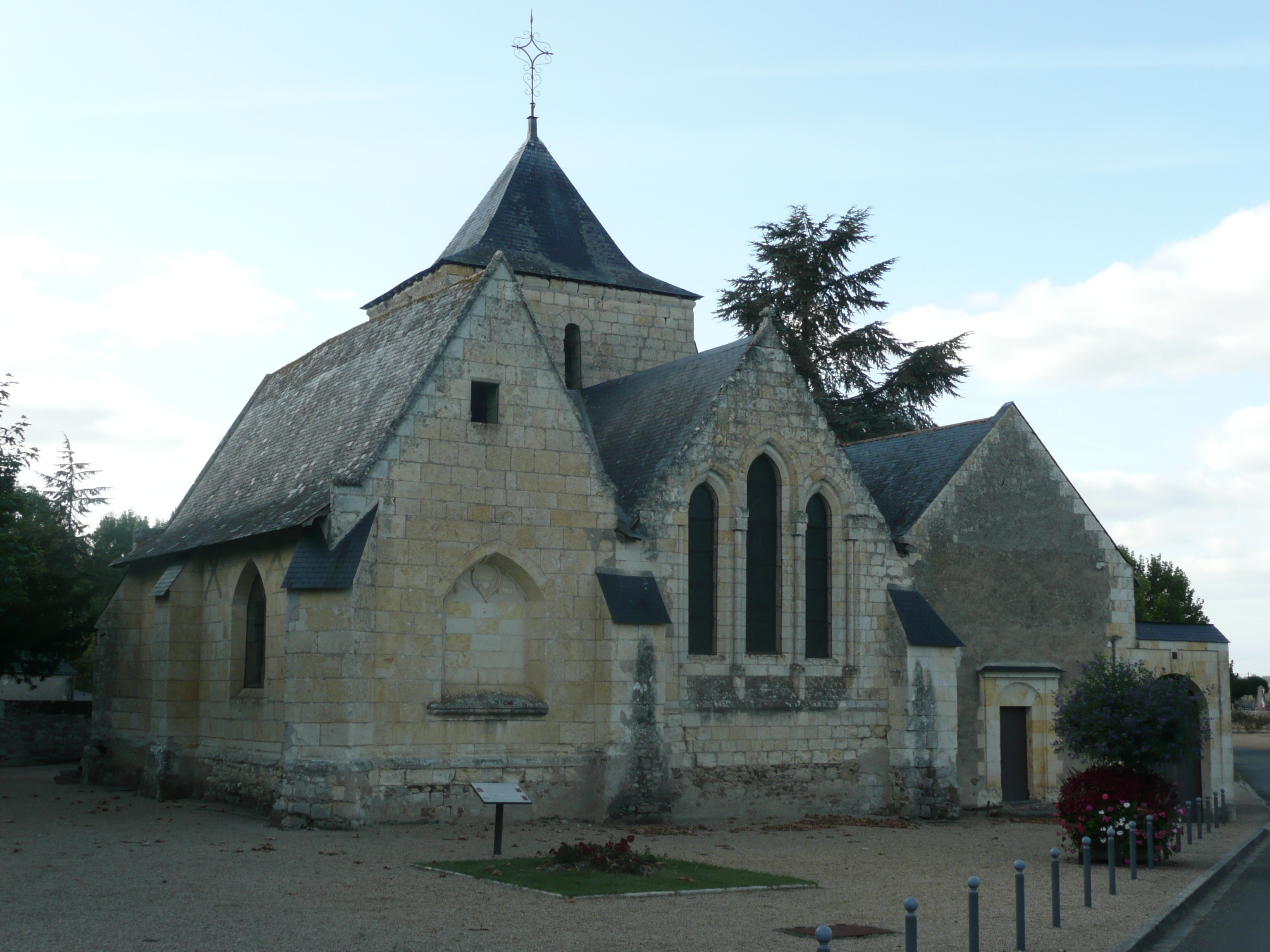 Charcé - Eglise .